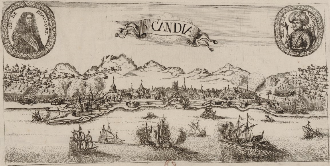 Estampe anonyme allemande donnant une vue du siège de Candie en 1669 au moment de l'intervention française avec l'escadre du duc de Beaufort (détail)